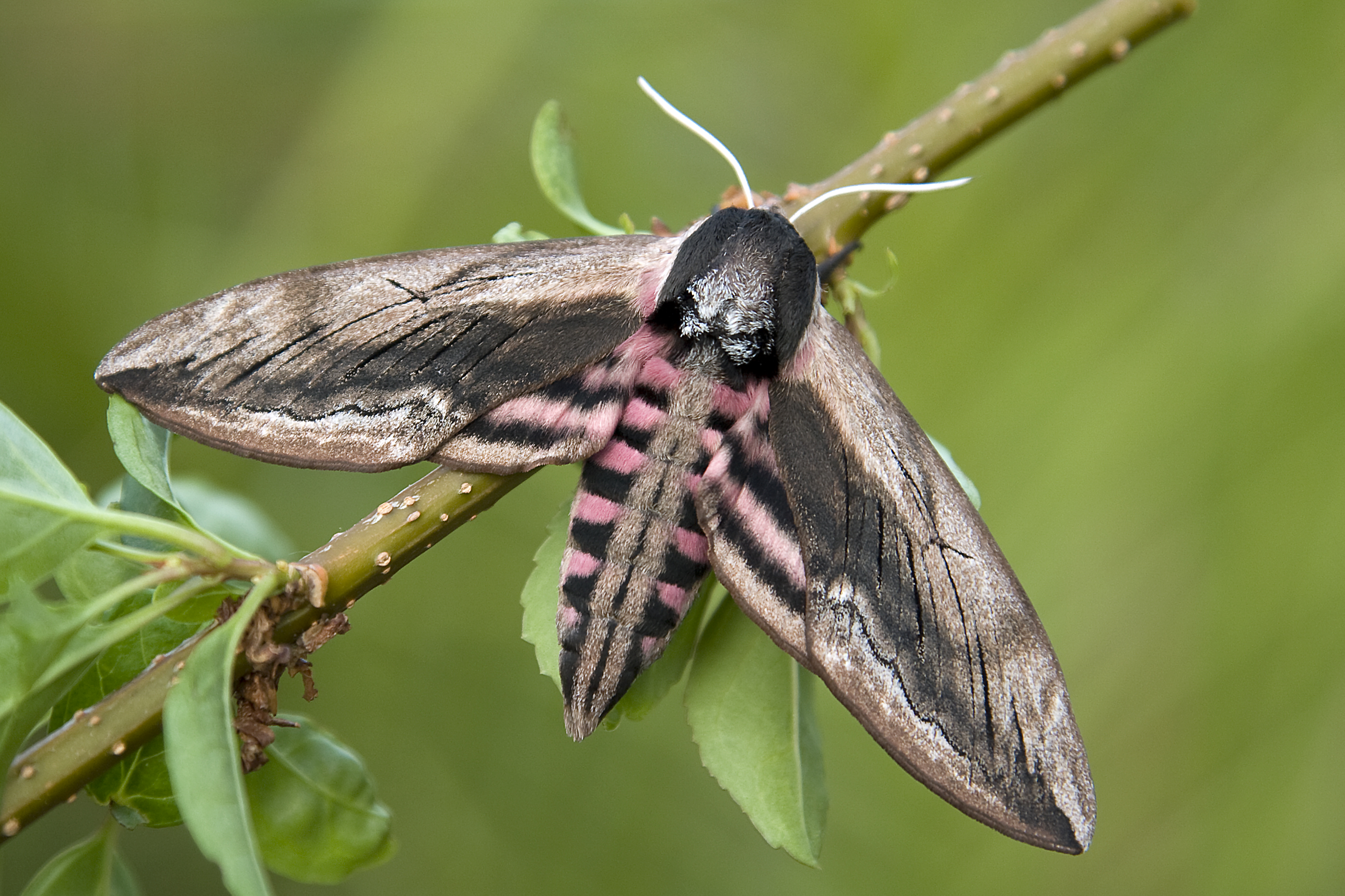 nach dem Schlüpfen - aufgenommen in 33428 Harsewinkel (Germany)